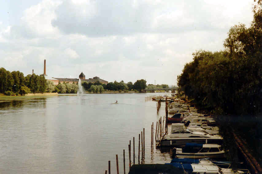 Kokemäenjoki, Pori.